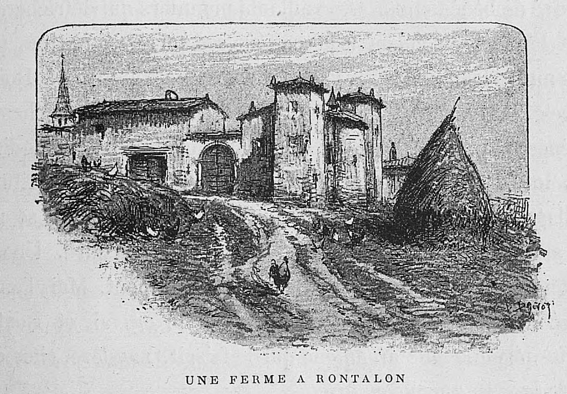 Aux environs de Lyon / Monsieur Josse ; préface de M. Coste-Labaume ; édition illustrée de 250 dessins de J. Drevet.